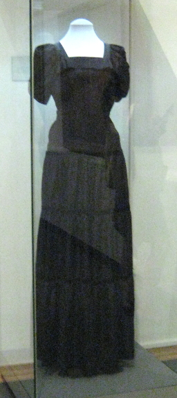 Платье А. Коллонтай. 1930-е. ГИМ